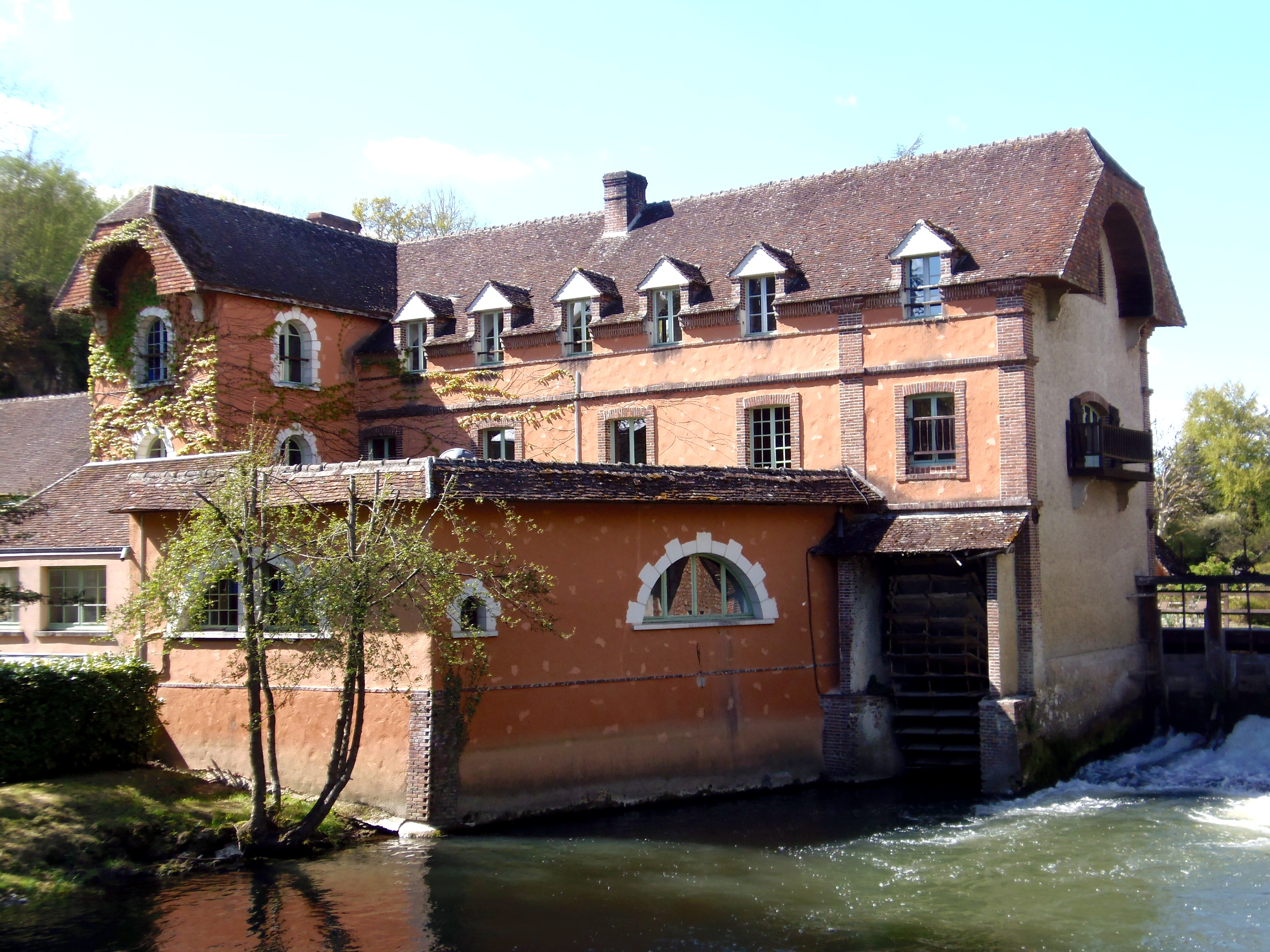 Condeau (Normandie, France). L'ancien moulin sur l'Huisne.